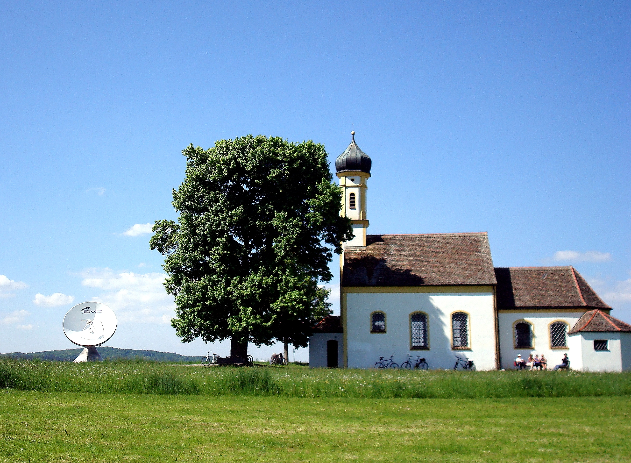 Die kleine, idyllisch gelegene, ehemalige Wallfahrtskirche St. Johannes der Täufer ist auf eine bizarre Weise von den Großantennen der Satelliten-Erdfunkstelle Raisting umgeben, einer Bodenstation für die Kommunikation mit Nachrichtensatelliten. Der spätgotische Saalbau mit stark eingezogenem Polygonalchor, angefügter Sakristei und kleinem Westturm stammt aus dem Jahre 1428. Das Langhaus mit polygonalem Turmaufsatz und der Zwiebelhaube wurde 1725 erneuert. This is a photograph of an architectural monument.